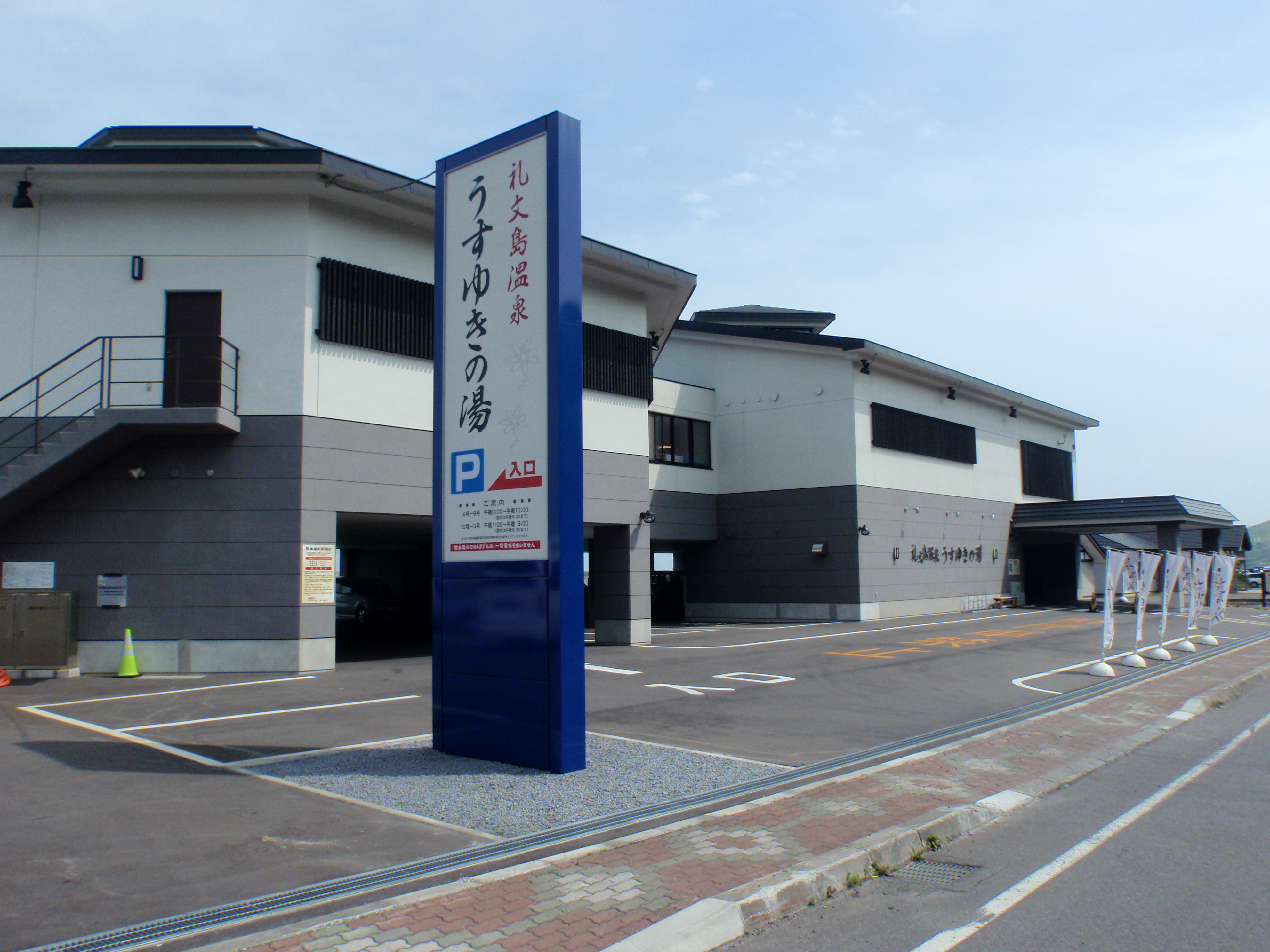 礼文島温泉うすゆきの湯